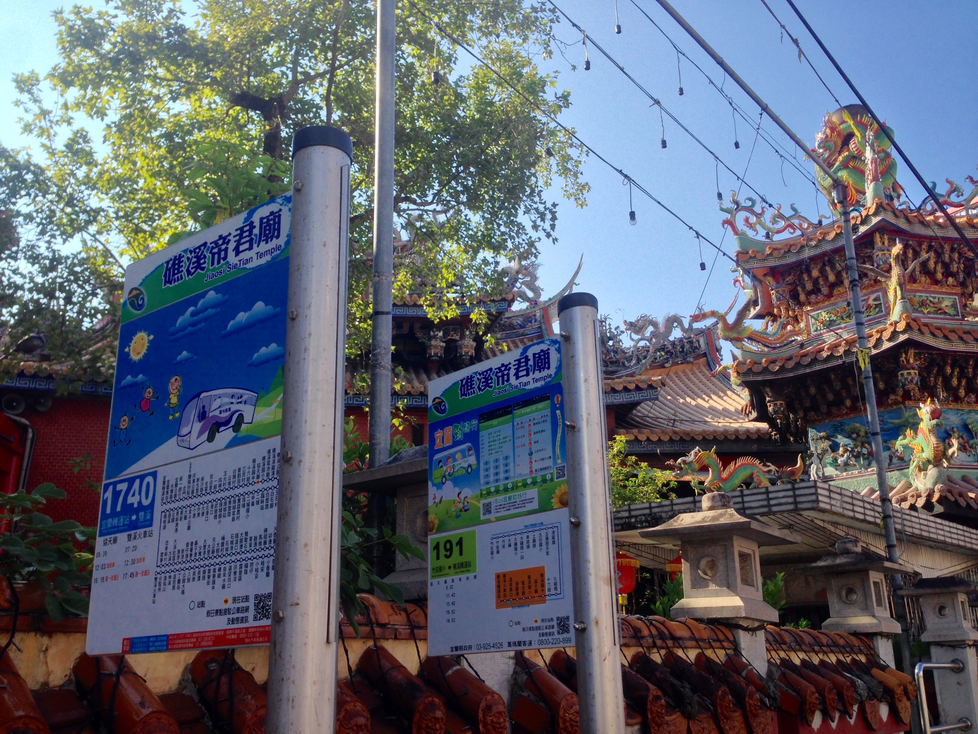 中文（台灣）: 礁溪帝君廟圍牆外，宜蘭勁好行「礁溪帝君廟」站牌。